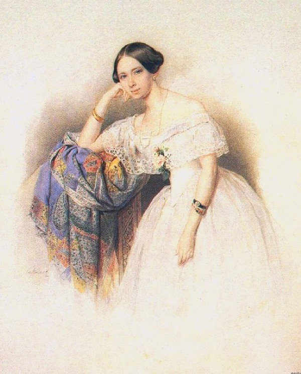 "Портрет А.С.Глинки-Мавриной" Александра Семеновна Глинка-Маврина (1825-1885) - жена Бориса Григорьевича Глинки, Андреевского кавалера, генерал - адъютанта, племянника В.К. Кюхельбекера.